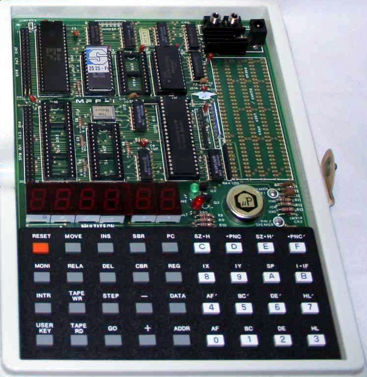 Überarbeitete Version des Micro Professors 1